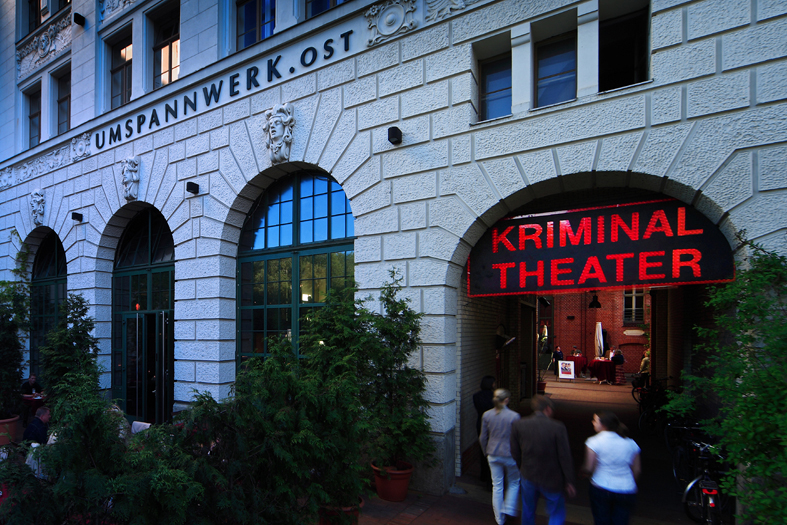 Berliner Kirminaltheater, Palisadenstr. 48, 10243 Berlin-Friedrichshain